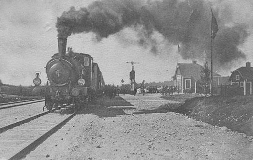 Varberg-Ätrans Järnväg invigs den 21 augusti 1911. Tåget passerar Gällareds station.